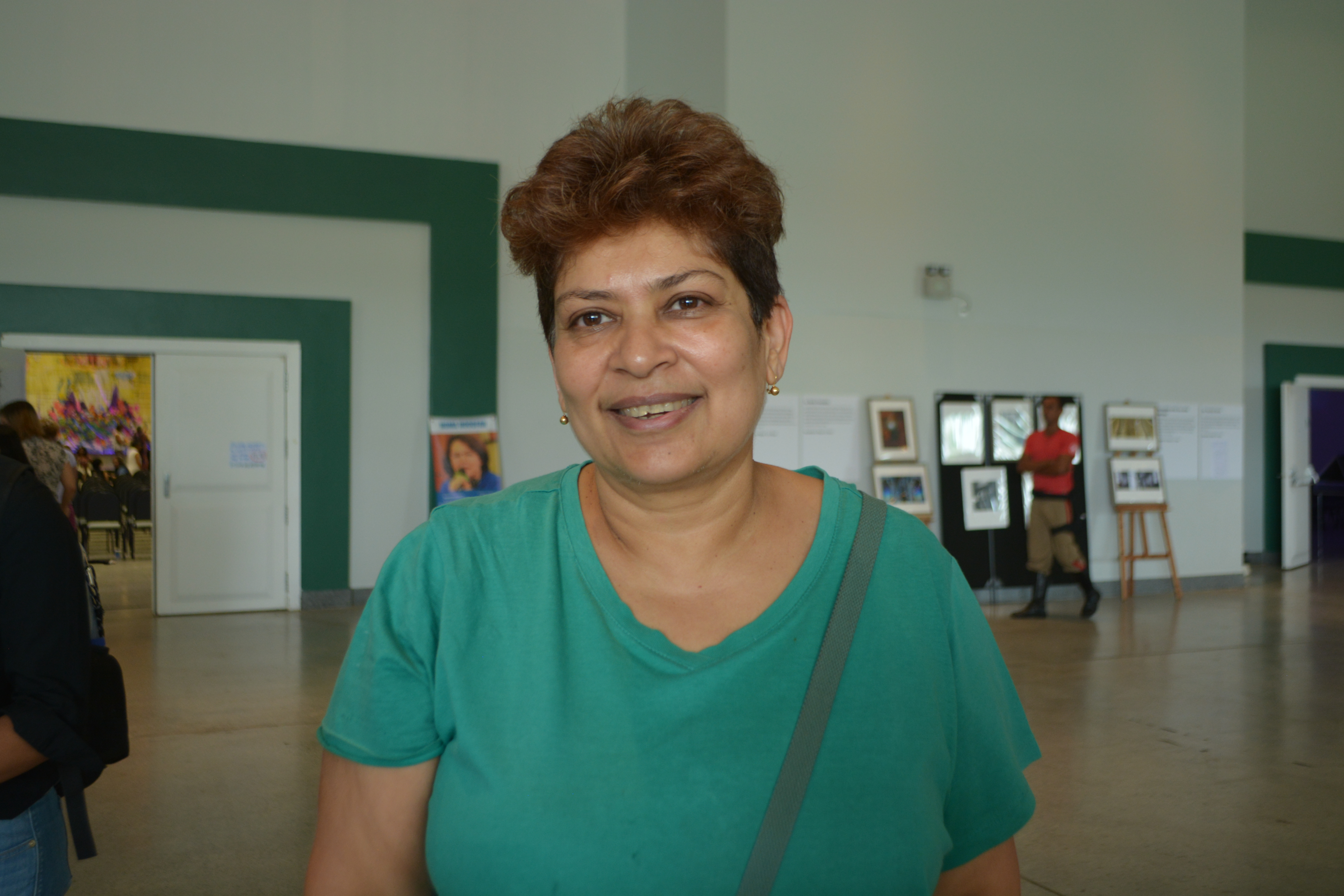 Feminista en AWID 2016